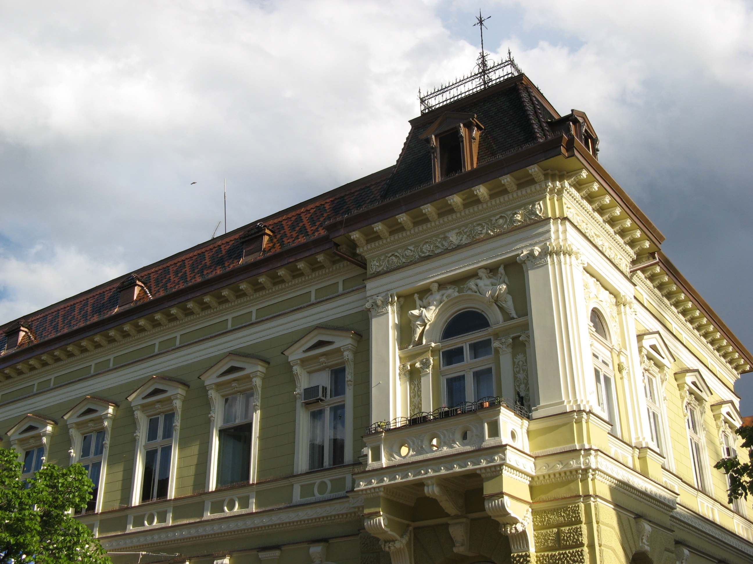 Суботички архитекта Титус Мачковић пројектовао је најамну палату 1881. године за Самка Манојловића. Једноспратни угаони објекат у облику правоугаоника, изграђен је у стилу еклектике са доминантним елементима неоренесансе.